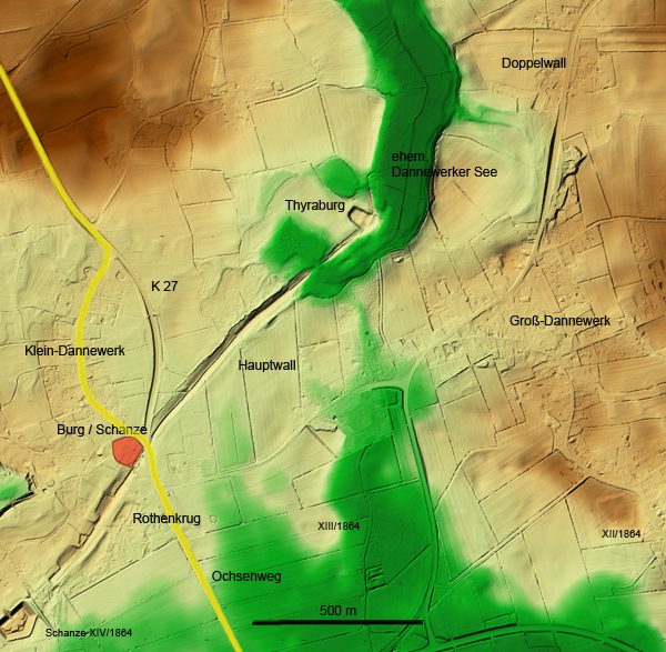 3d-Karte des Danewerk - Hauptwalles mit Schanze von 1658/60; Arbeit erstellt in 3d-Nature